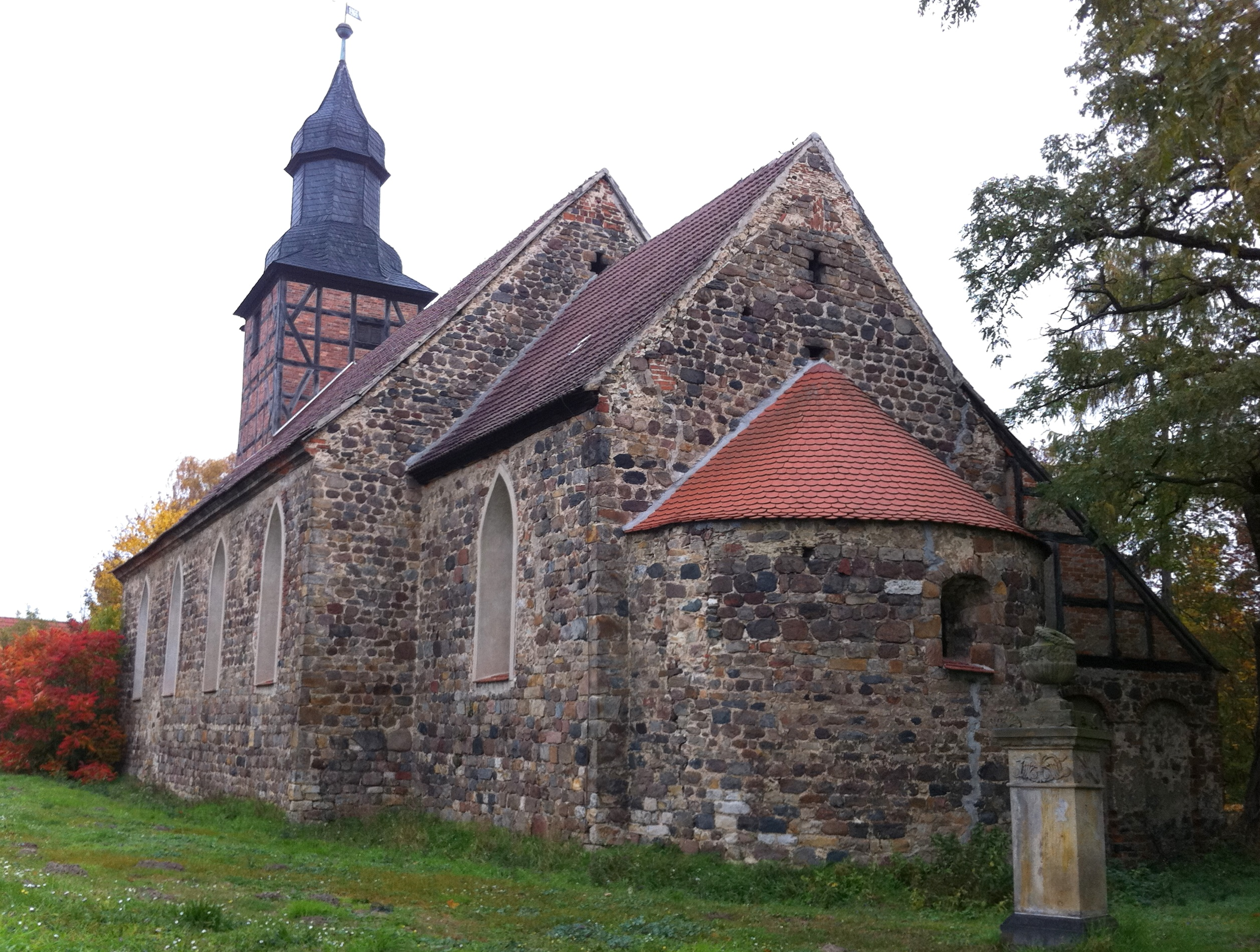 Sankt-Petri-Kirch in Stegelitz